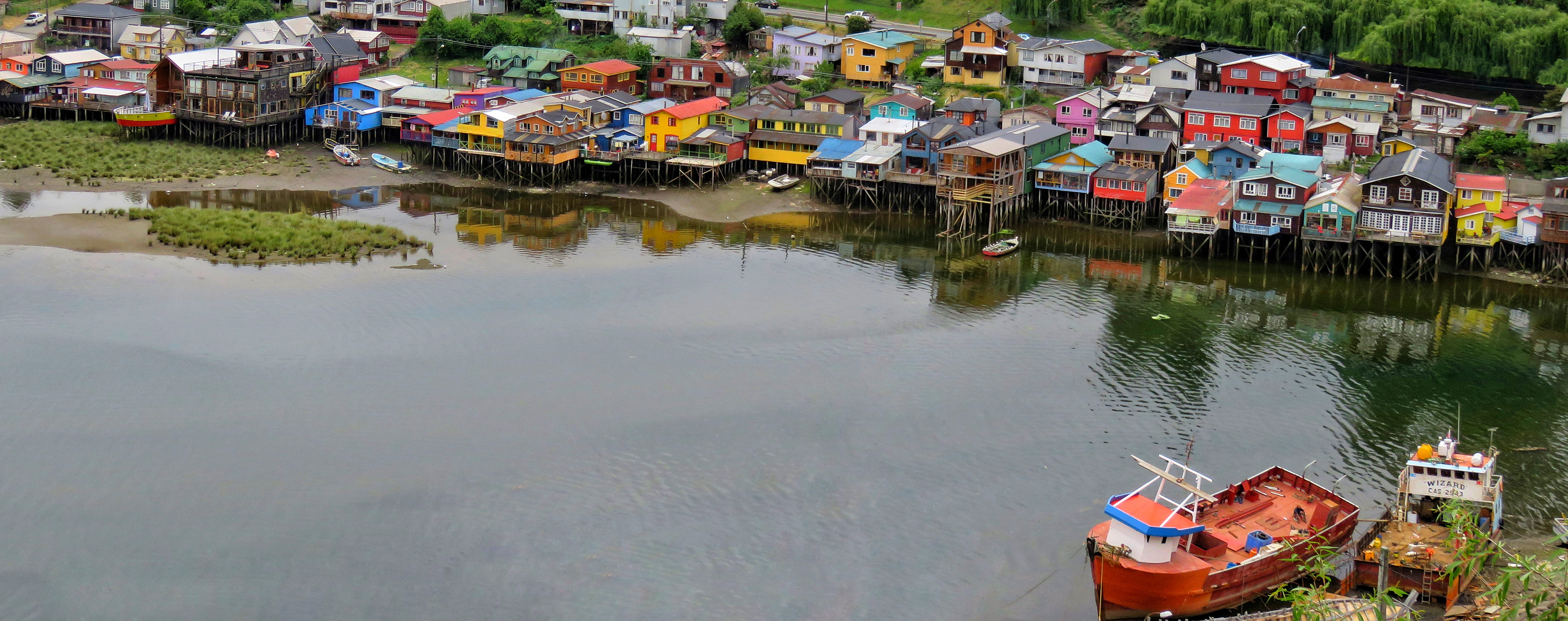 L'une des caractéristiques de l'île de Chiloé sont les maisons sur pilotis, aux couleurs vives.